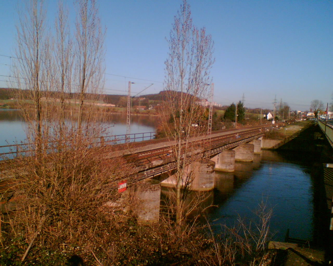 Ruhrbrücken (Straße und Schiene) in Wetter am Harkortsee, im Hintergrund Hagen-Vorhalle